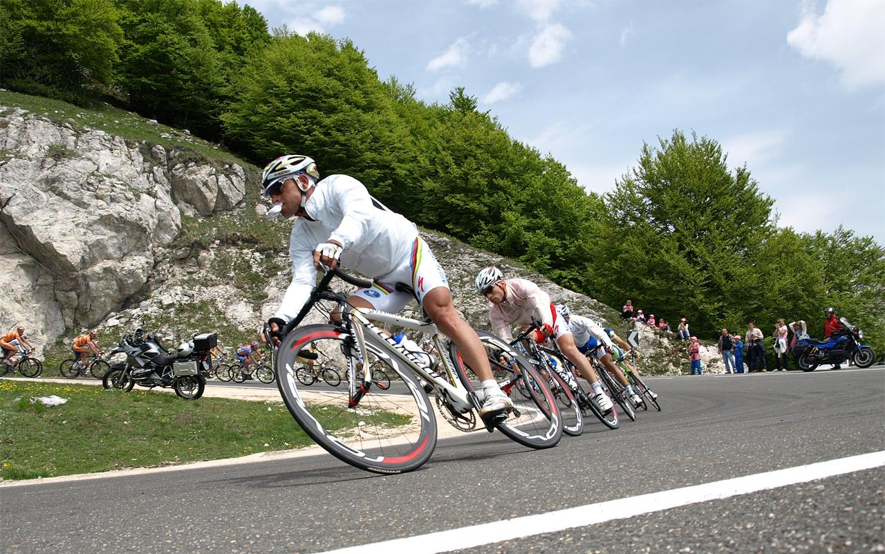 Scattata durante l'8° tappa (17/05/2008) in località Forca d'Acero (FR) World champion Paolo Bettini on "Giro d'Italia"